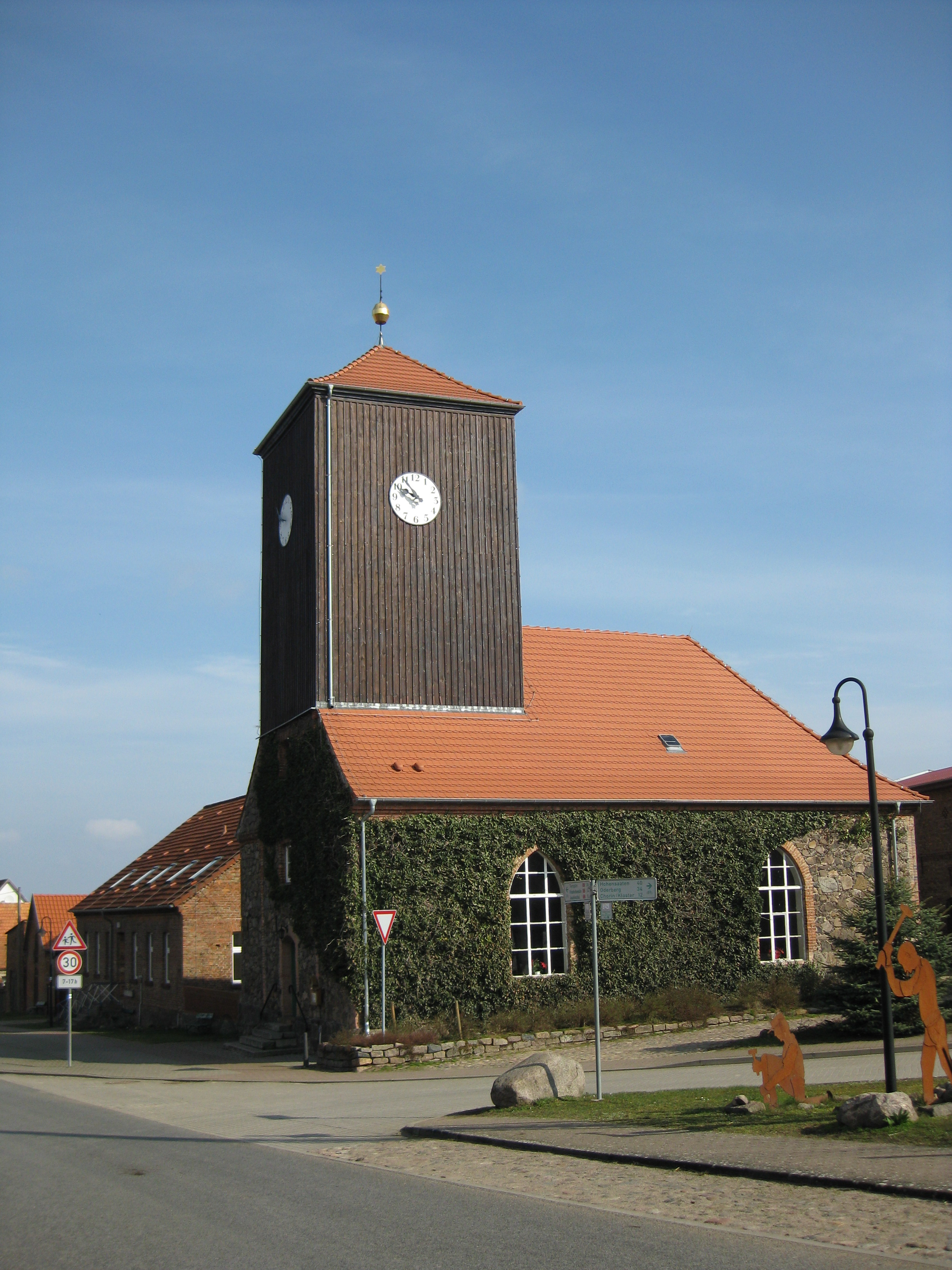 Dorfkirche in Althüttendorf bei Joachimsthal im Barnim.